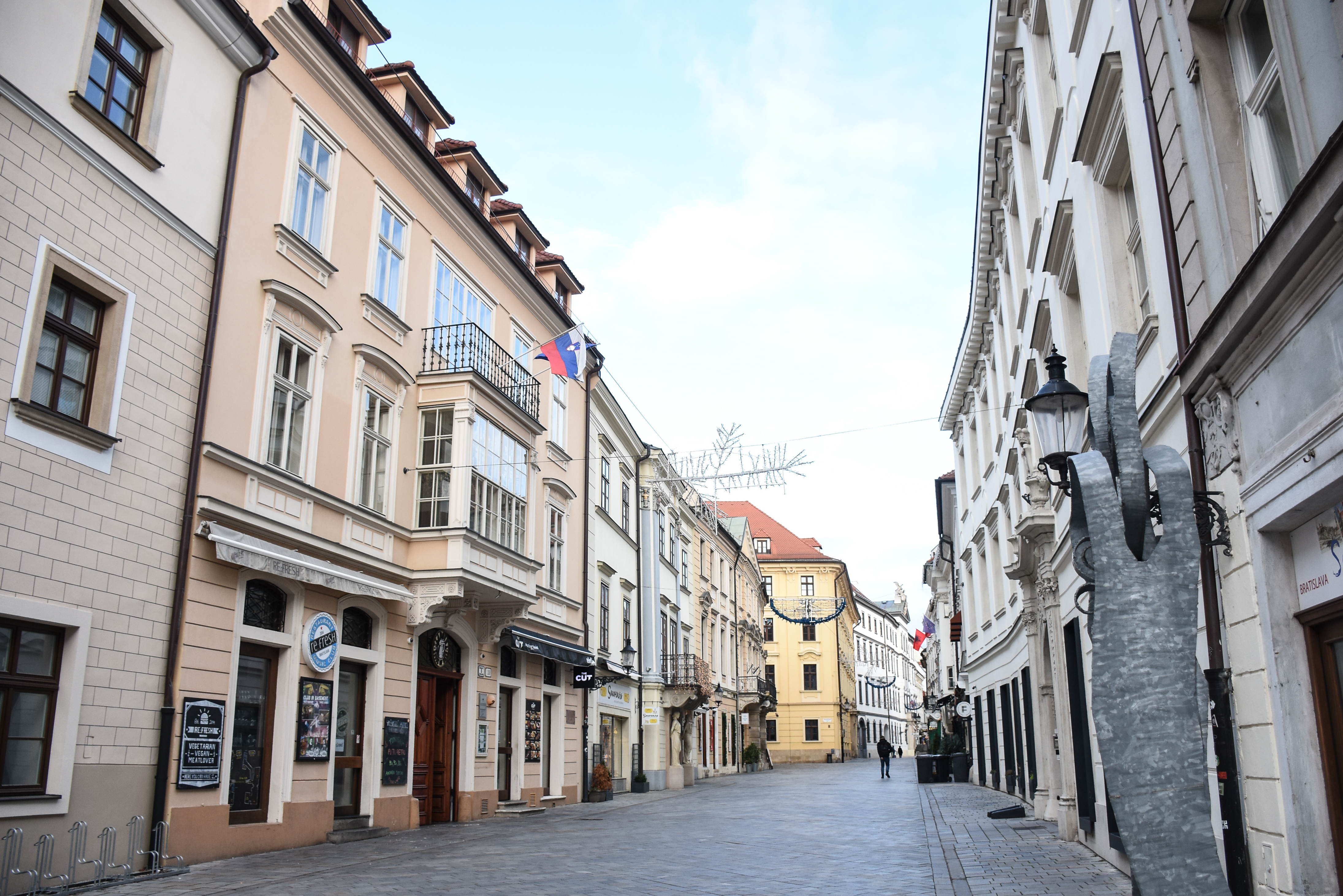 Veleposlaništvo Republike Slovenije v Bratislavi (Slovaška) Ambasada Embassy of the Republic of Slovenia in Bratislava (Slovakia) Botschaft der Republik Slowenien in Bratislava (Slowakei) Ambassade van de Republiek Slovenië in Bratislava (Slowakije) Ambassade de la République de Slovénie à Bratislava (Slovaquie) Embajada de la República de Eslovenia en Bratislava (Eslovaquia)